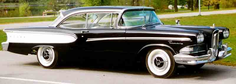 Edsel Pacer 2-Door HT 1958